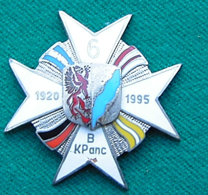 Odznaka 6 BPanc ze Stargardu Szczecińskiego